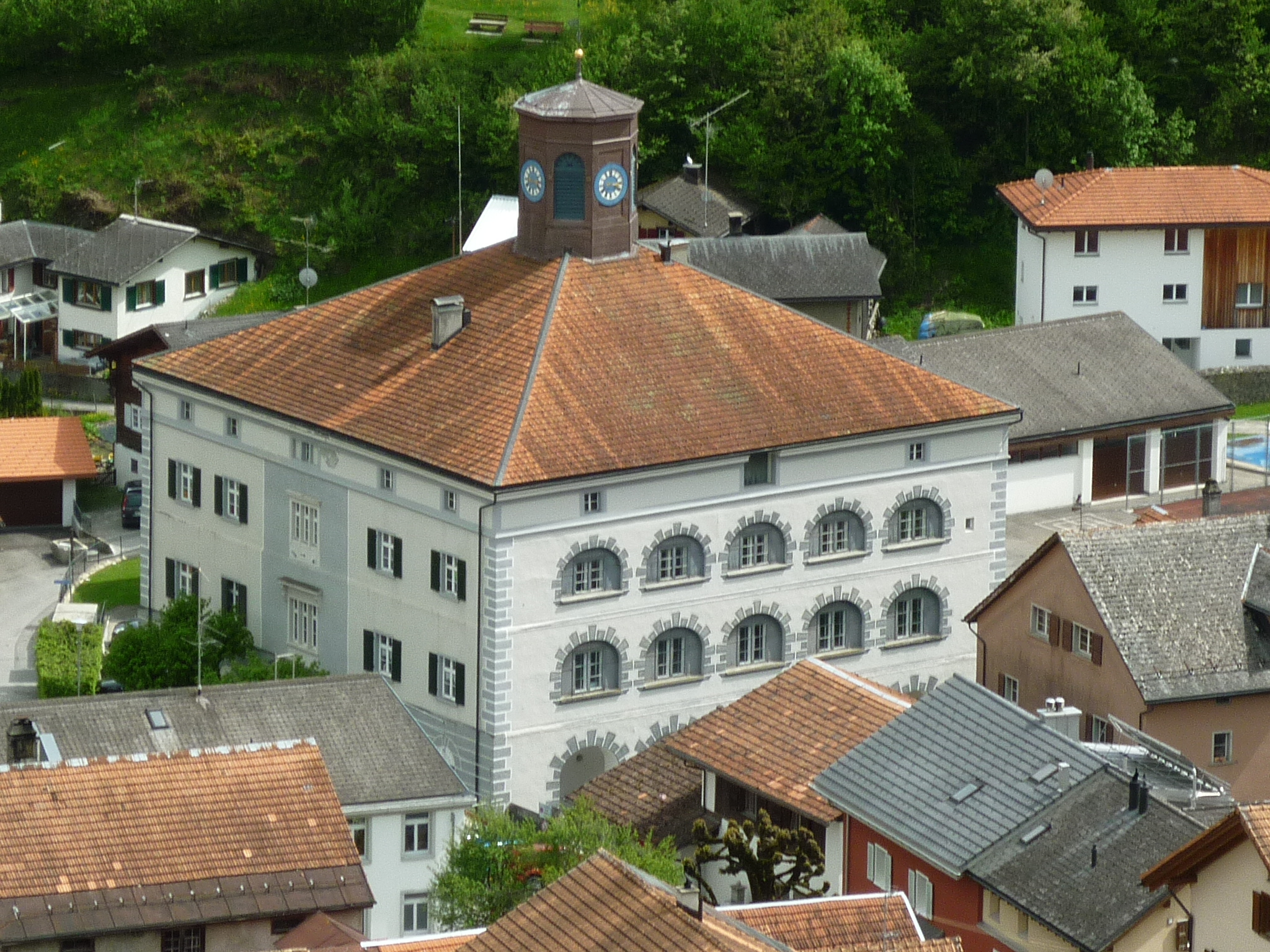 Von Salis Haus, Seewis GR, Schweiz